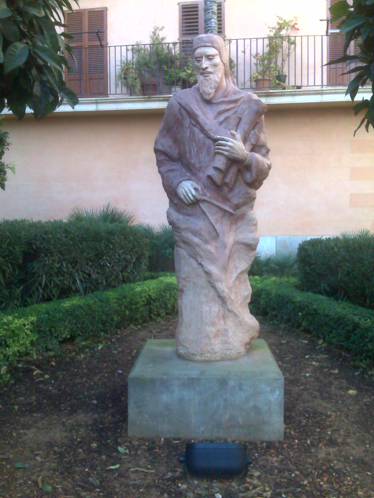 Estatua de Jafuda Cresques realitzada per Maria Isabel Ballester, situada a la Plaça del Temple de Palma, prop d'on els Cresques tengueren la seva casa i el seu taller